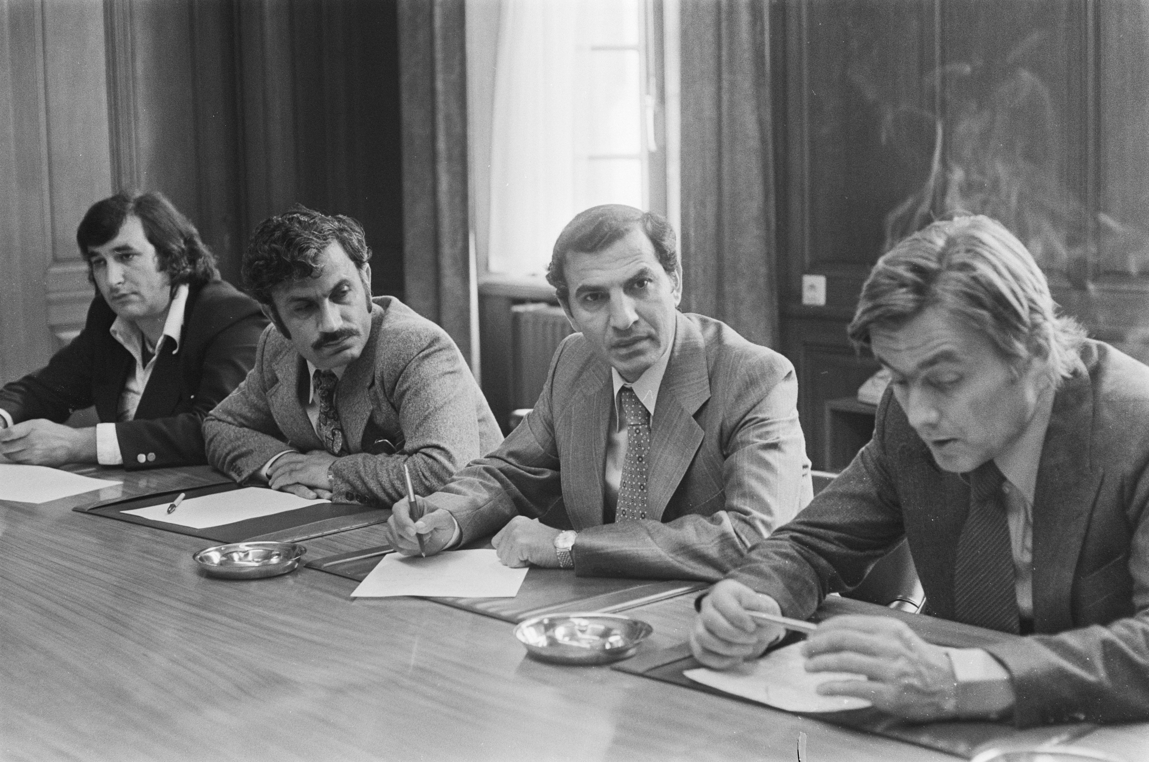 Collectie / Archief : Fotocollectie Anefo Reportage / Serie : [ onbekend ] Beschrijving : Vaste Kamercommissie Bui Za spreekt met vertegenwoordigers PLO; links Naim Khader (PLO-Brussel) naast hem Kulak (Parijs) rechts voorz. Piet Dankert Datum : 8 september 1977 Locatie : Frankrijk, Parijs Trefwoorden : Kamercommissies, politiek Persoonsnaam : Dankert, Piet Fotograaf : Verhoeff, Bert / Anefo Auteursrechthebbende : Nationaal Archief Materiaalsoort : Negatief (zwart/wit) Nummer archiefinventaris : bekijk toegang 2.24.01.05 Bestanddeelnummer : 929-3387